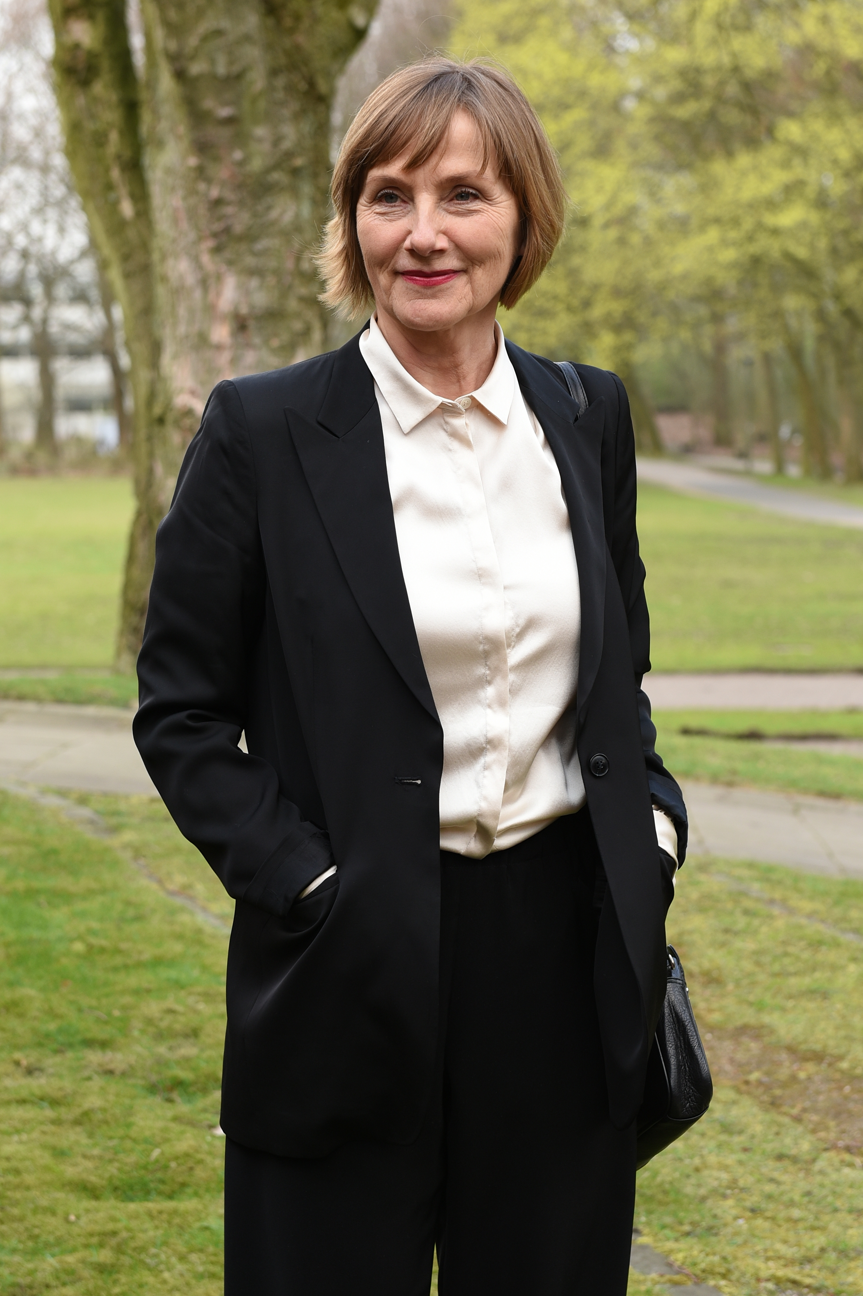 Verleihung des Grimme-Preises 2016.